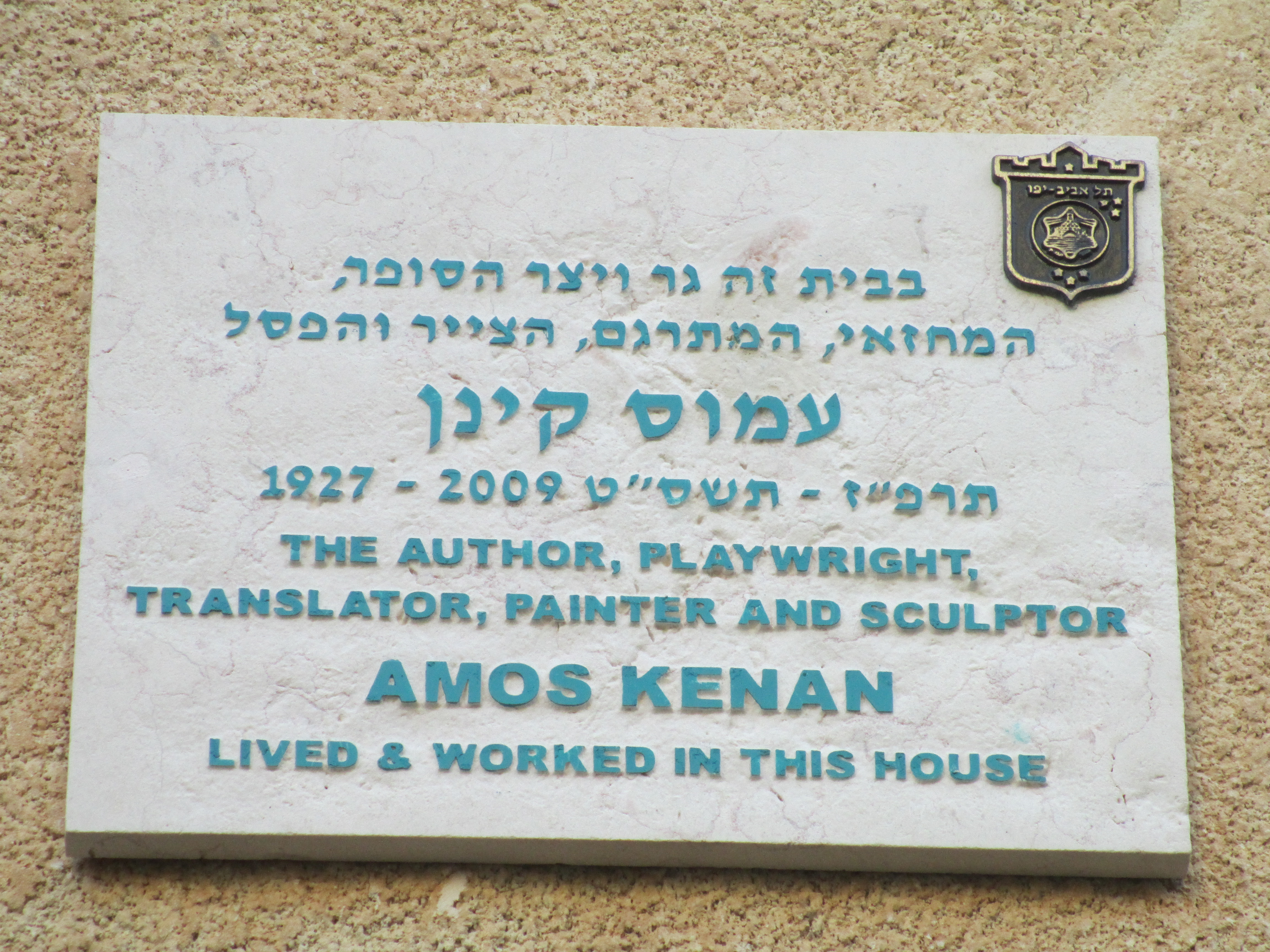 לוחית זיכרון על ביתו של עמוס קינן ברח' בר כוכבא 10 בתל אביב